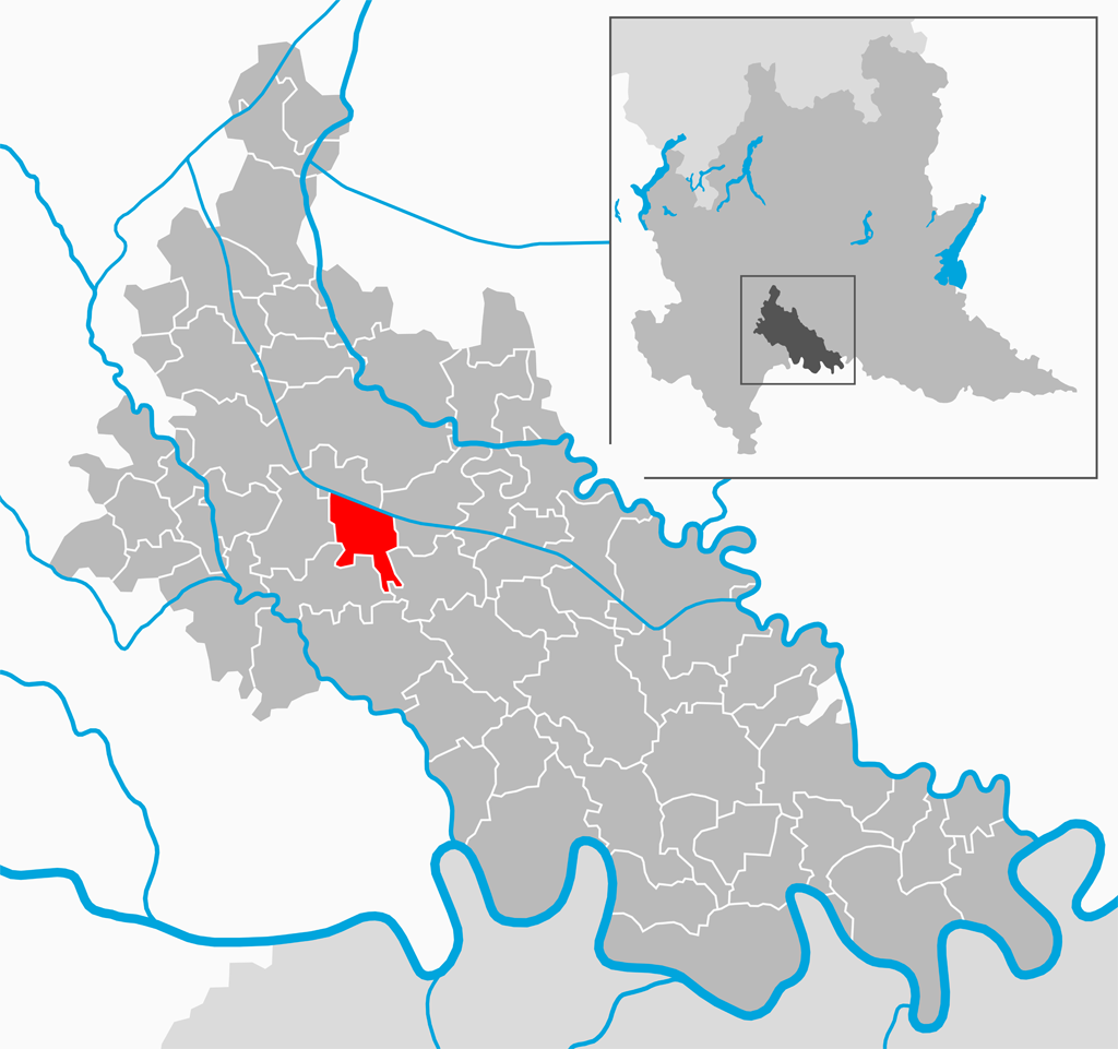 Il comune di Massalengo nella provincia di Lodi